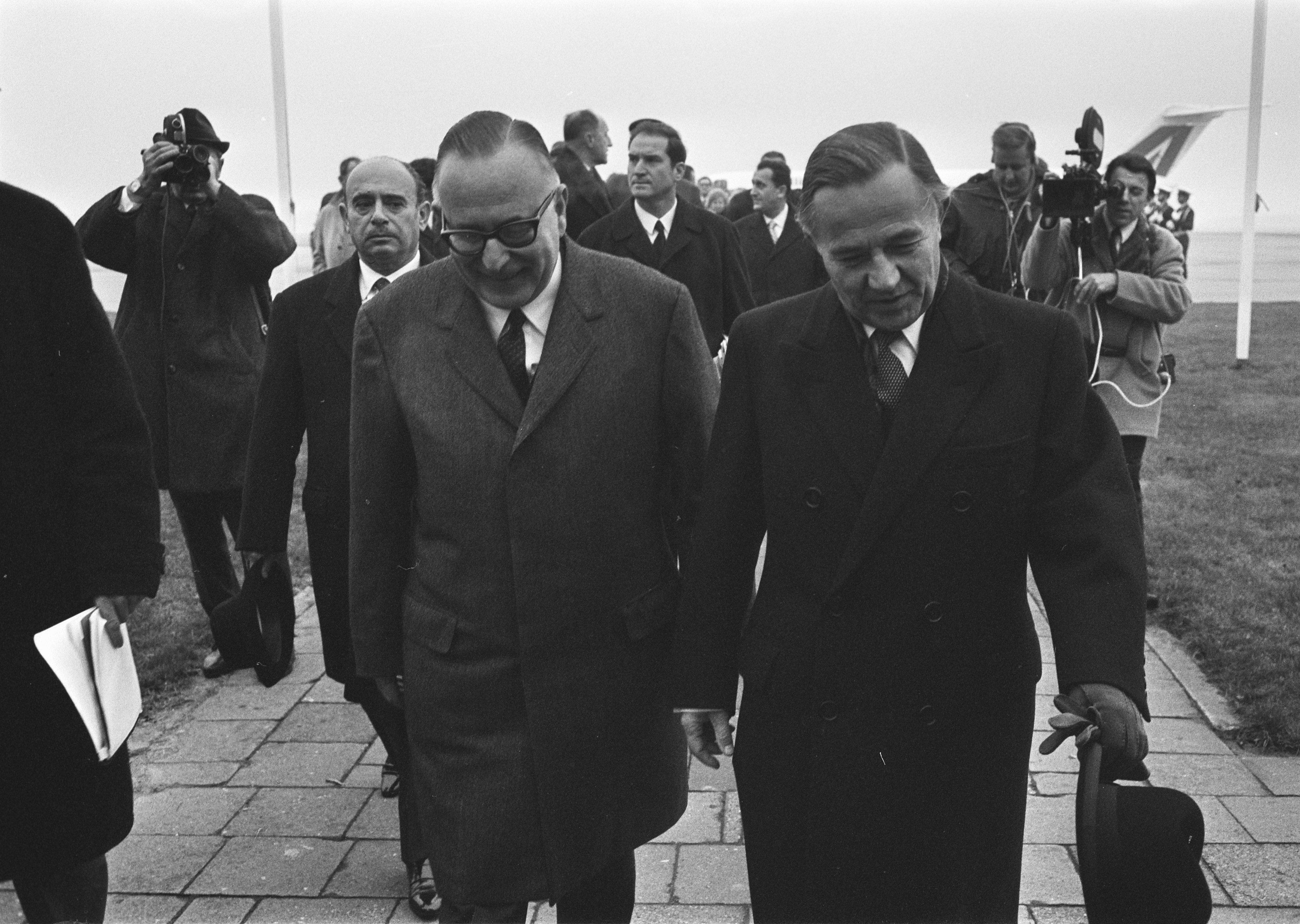 Collectie / Archief : Fotocollectie Anefo Reportage / Serie : [ onbekend ] Beschrijving : Aankomst Bondskanselier Willy Brandt van Duitsland op Ypenburg. Aankomst Rumor Datum : 1 december 1969 Trefwoorden : aankomsten Persoonsnaam : Bondskanselier Willy Brandt Fotograaf : Koch, Eric / Anefo Auteursrechthebbende : Nationaal Archief Materiaalsoort : Negatief (zwart/wit) Nummer archiefinventaris : bekijk toegang 2.24.01.05 Bestanddeelnummer : 923-0336